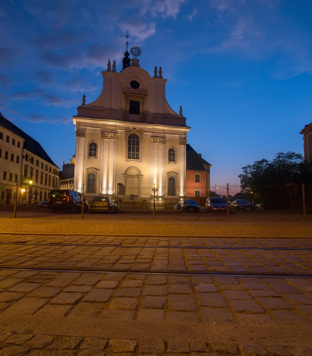 Wrocław, Kościół Imienia Jezus we Wrocławiu Wikidata has entry Q597262 with data related to this item.